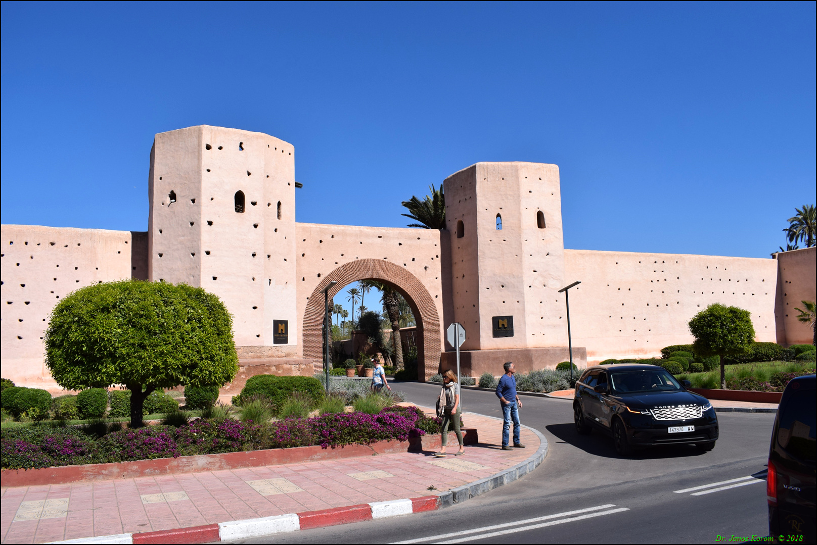 Bab al-Makhzen